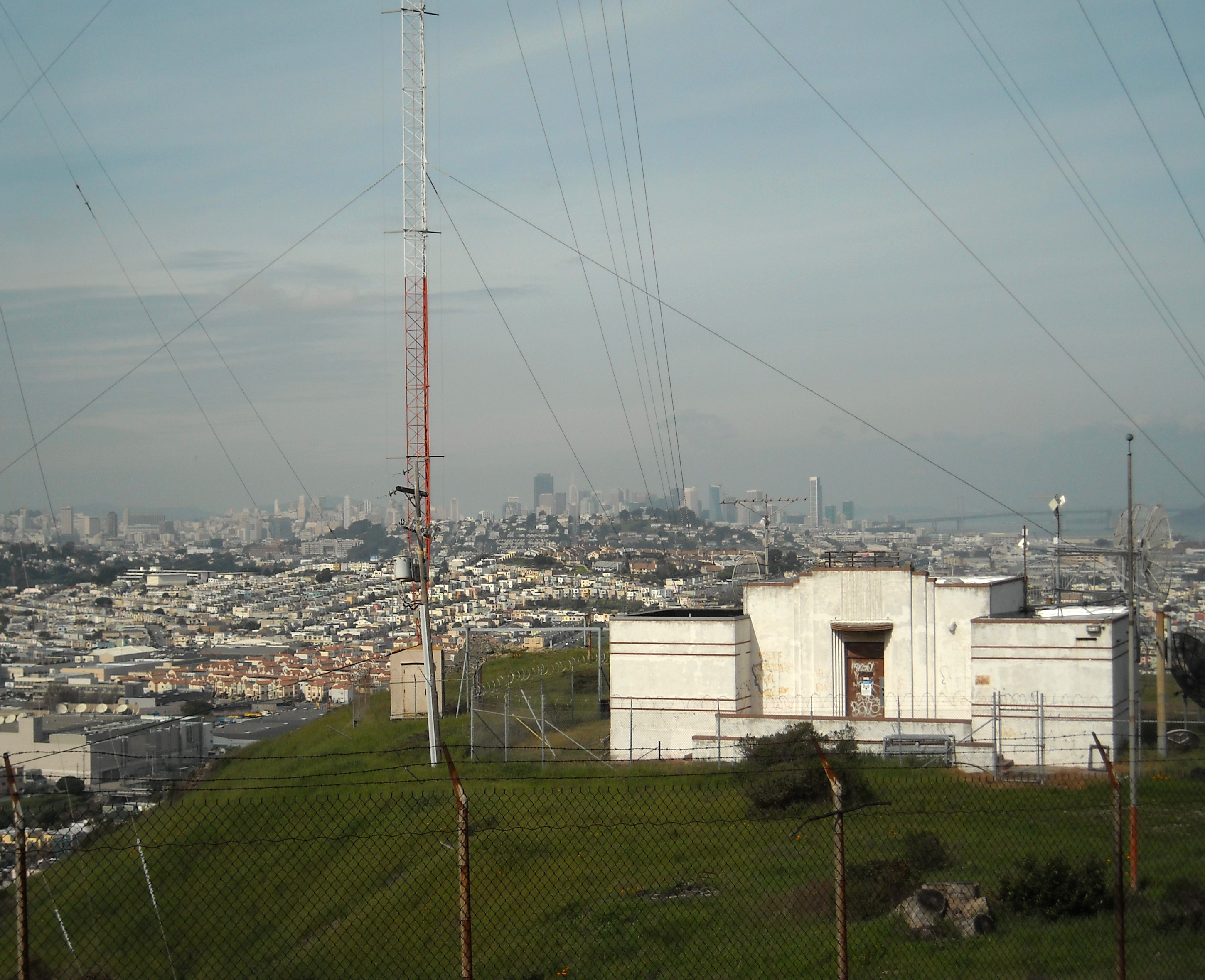 Antenna @ Bayview Park